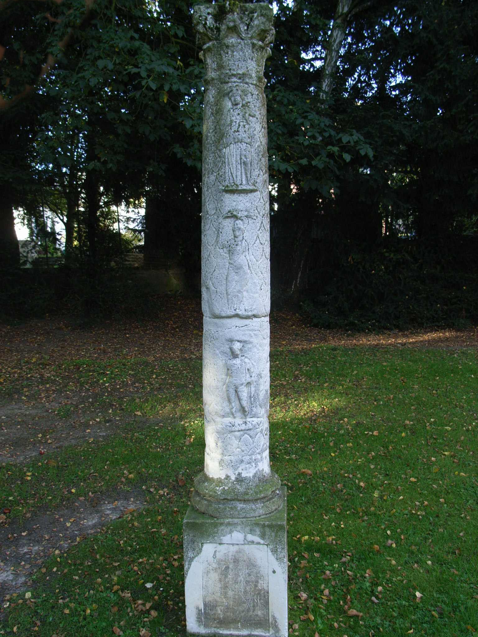 römische Jupitersäule (Replikat) an der kath.Kirche in Erkelenz-Lövenich,NRW